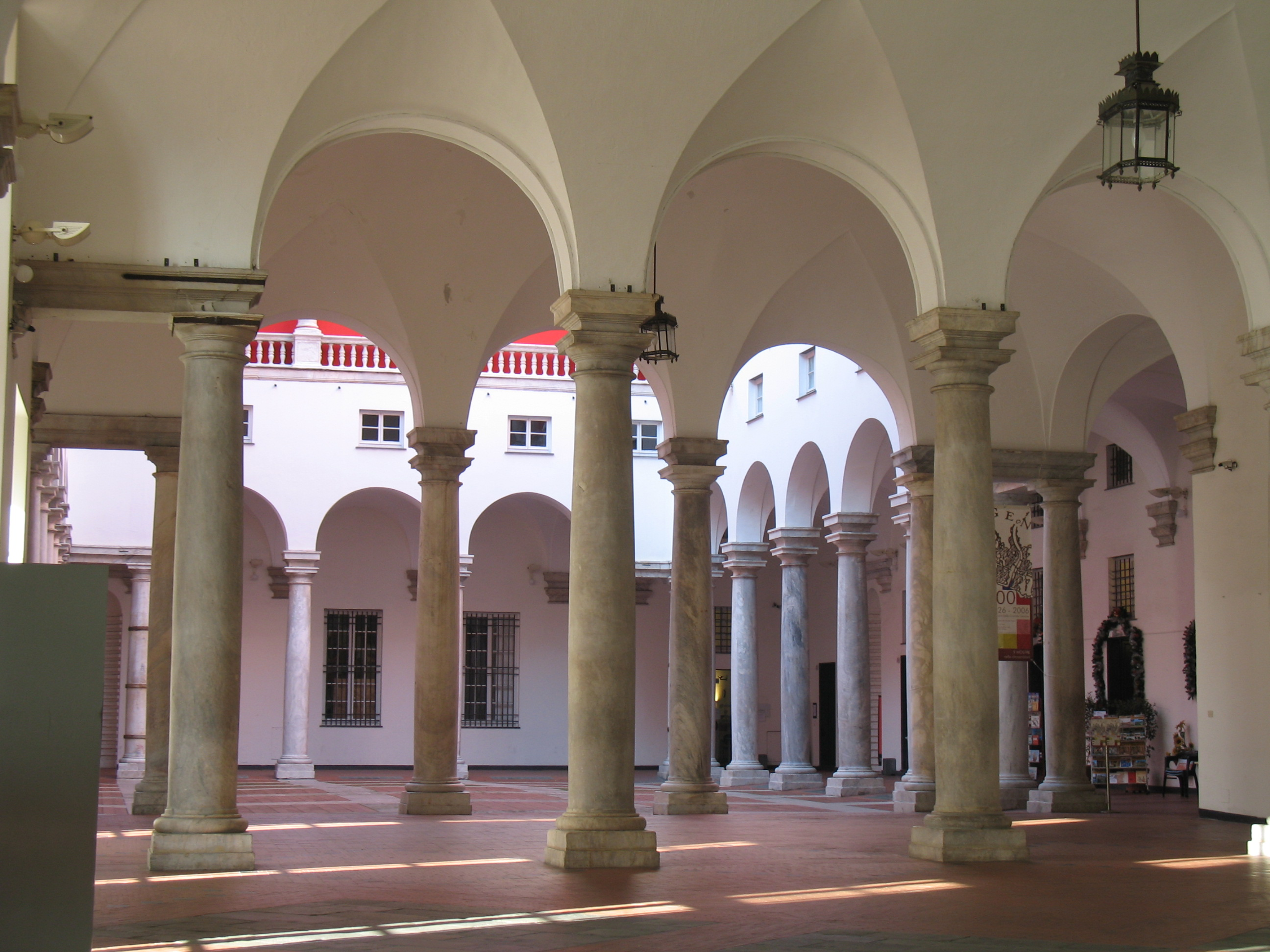 Immagine da Genova - Porticato del Palazzo Ducale